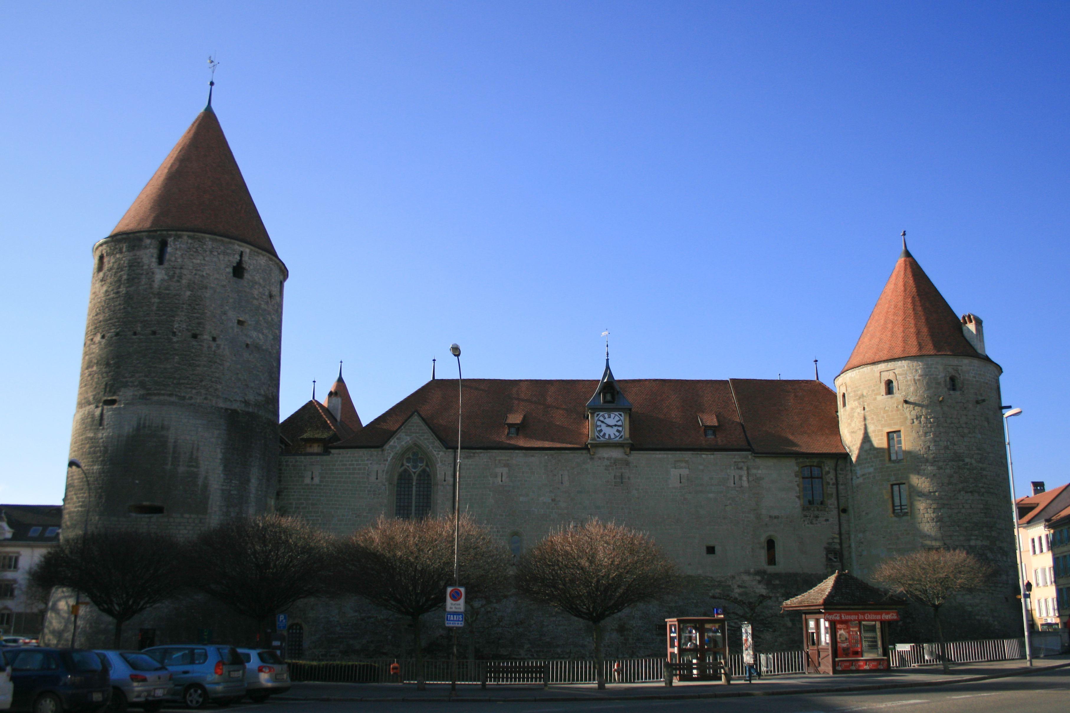 Façade est du Château